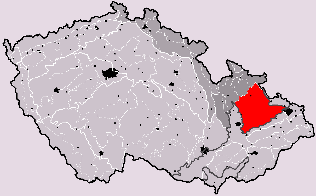 Poloha geomorfologického celku Nízký Jeseník v rámci České republiky. Hercynský systém Hercynská pohoří I Česká vysočina I4 (IV) Krkonošsko-jesenická subprovincie I4C (IVC) Jesenická oblast I4C-1 (IVC-1) Nízký Jeseník